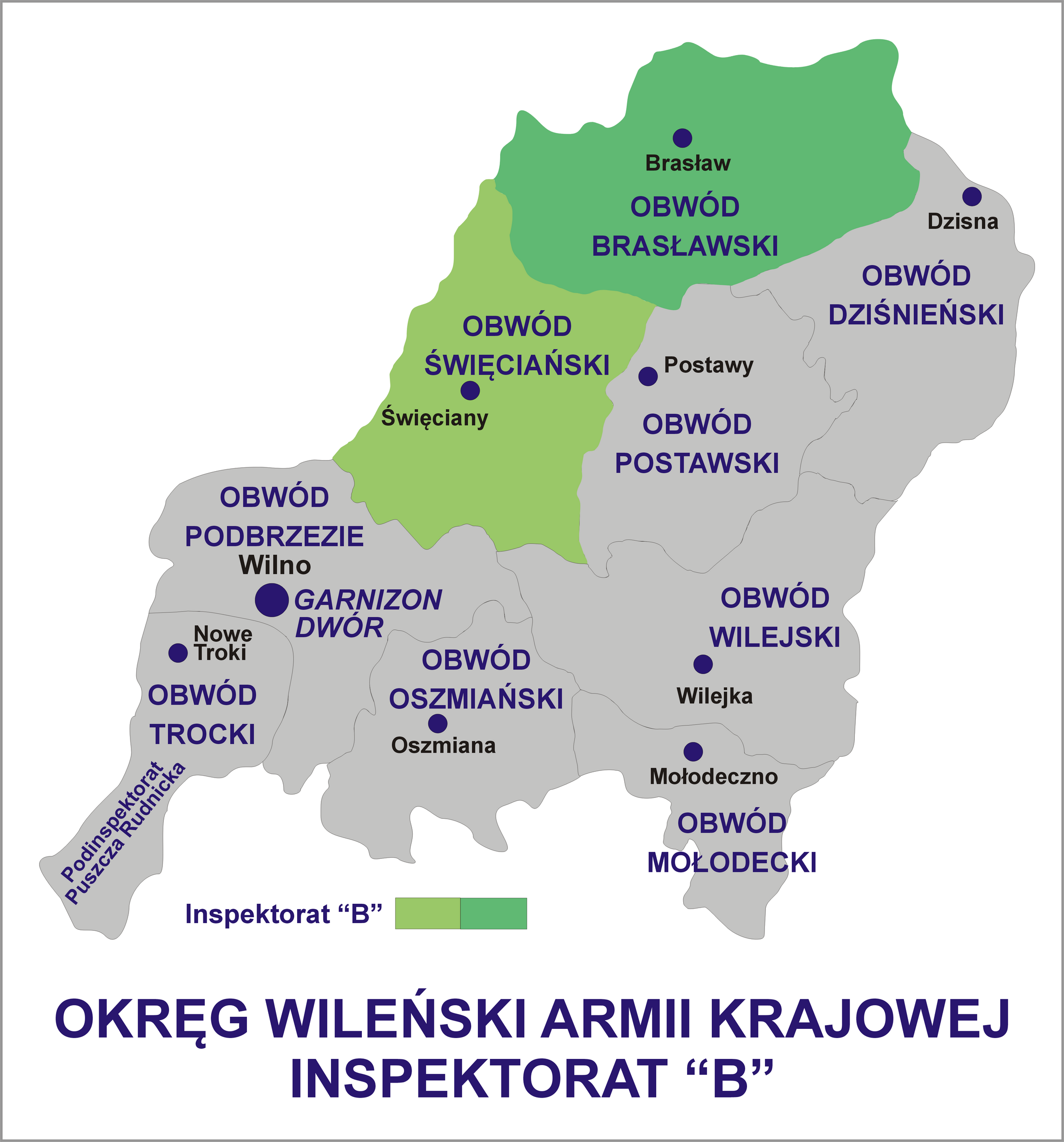 Okręg Wileński Armii Krajowej - Inspektorat "B"